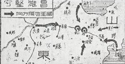 中文（中国大陆）: 1948年4月27日《中央日报》刊发的「昌潍坚守」示意图